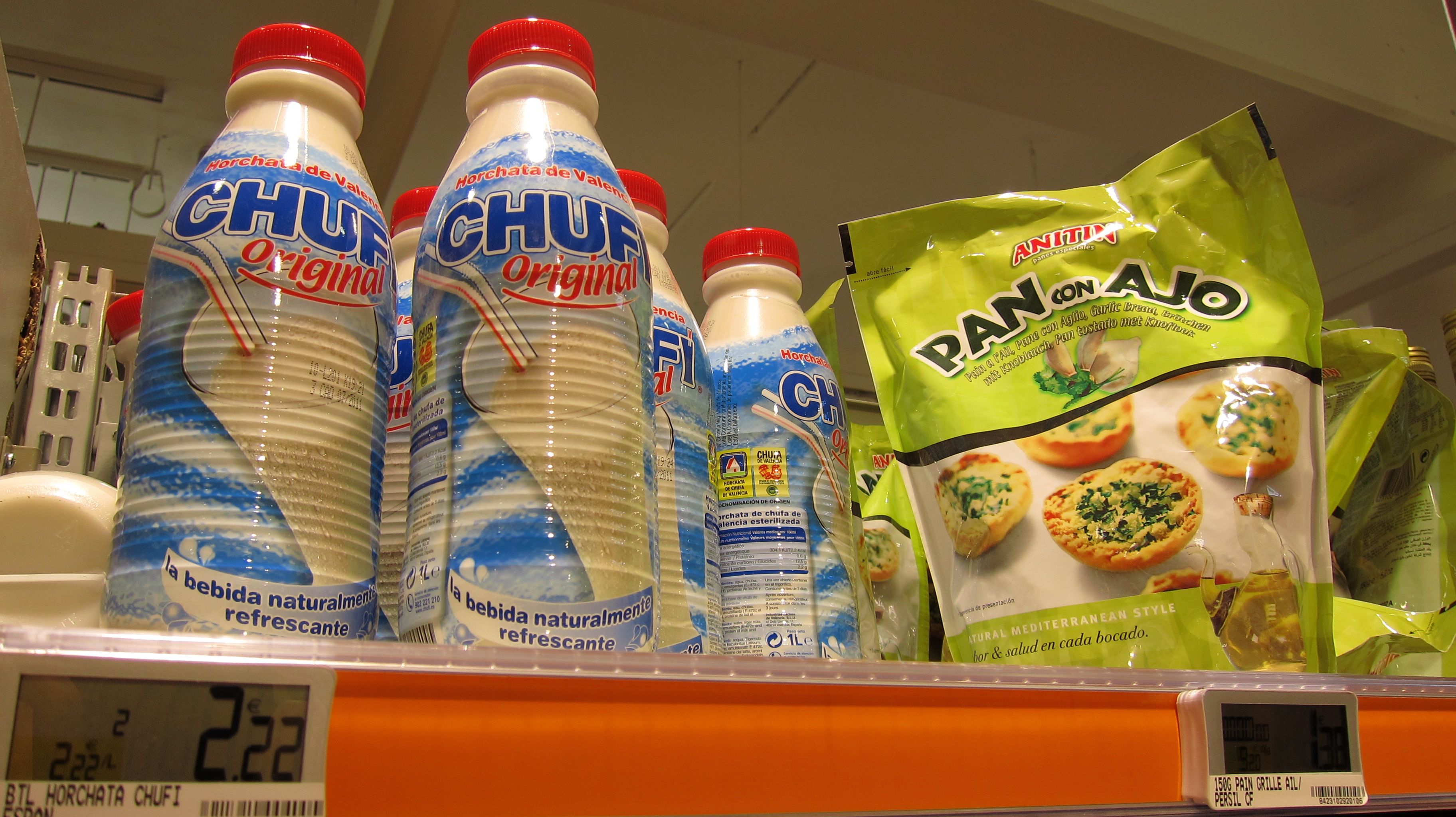 Rayon des produits espagnols au Monop' de Bercy Village à Paris (France) : Horchata de Chufi et Pan con ajo d'Anitín.